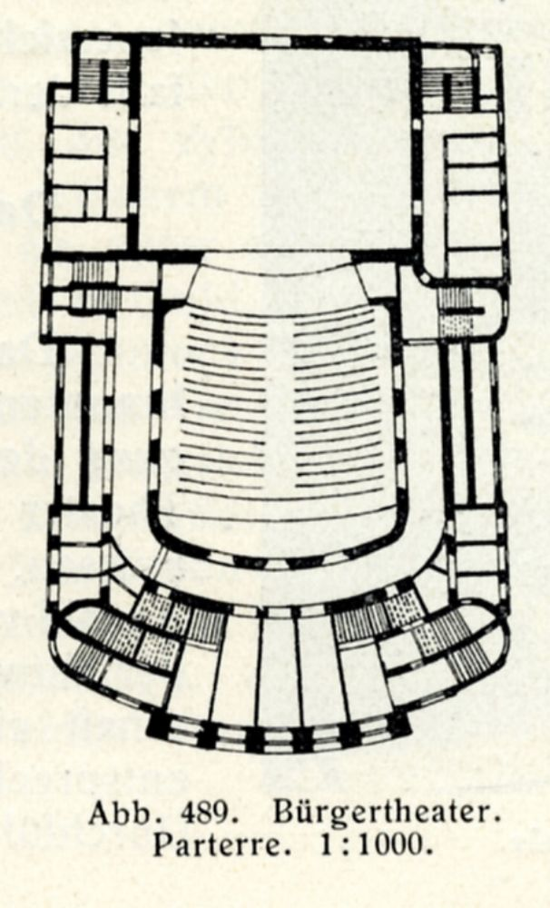 Das ehemalige Bürgertheater in Wien - Grundriss